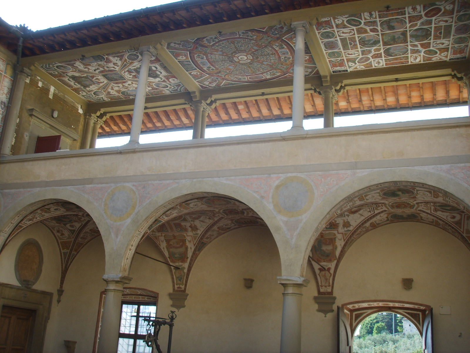 Villa il pozzino grottesche loggetta secondo piano